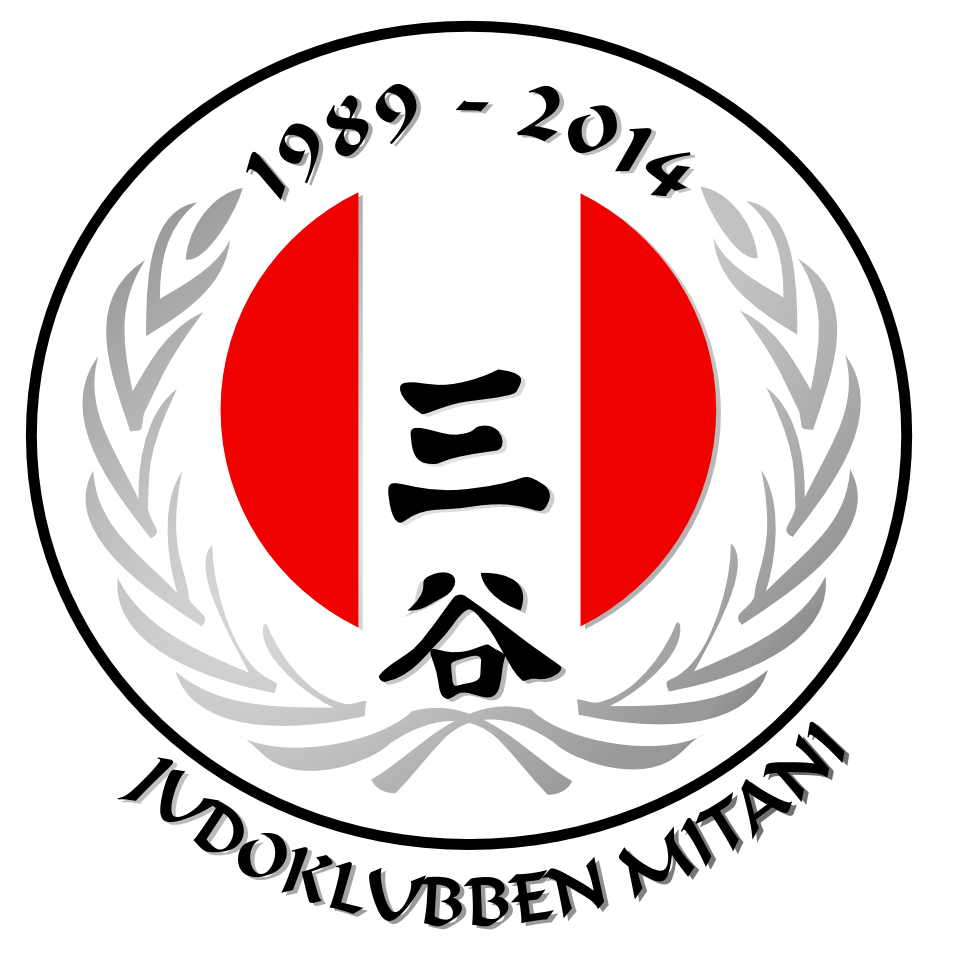 Judoklubben Mitanis jubilæumslogo udviklet af Freja Saurbrey i forbindelse med Mitanis 25 års jubilæum 2014.